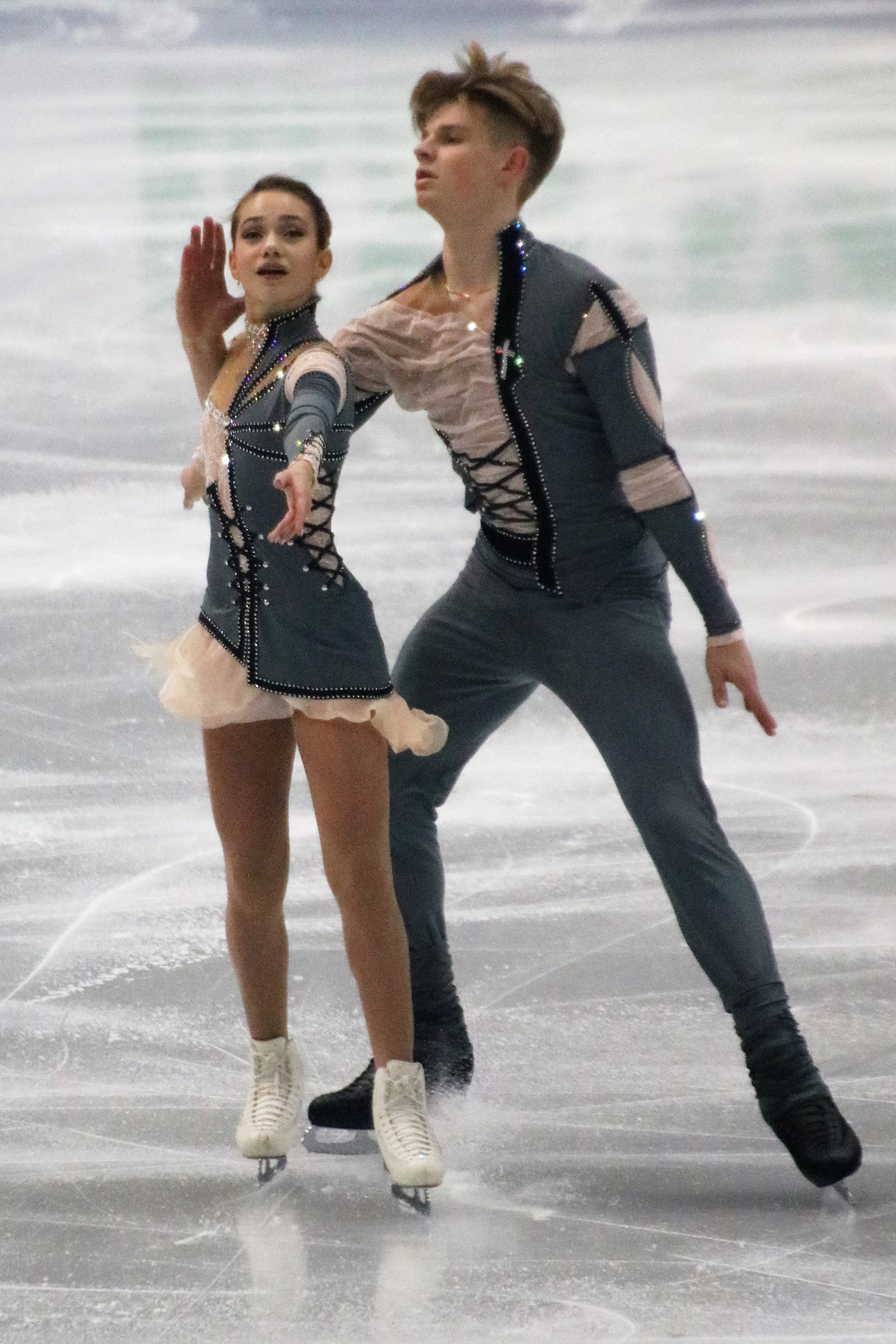 Алина Пепелева / Роман Плешков (Россия) на финале юниорского Гран-при 2019-2020